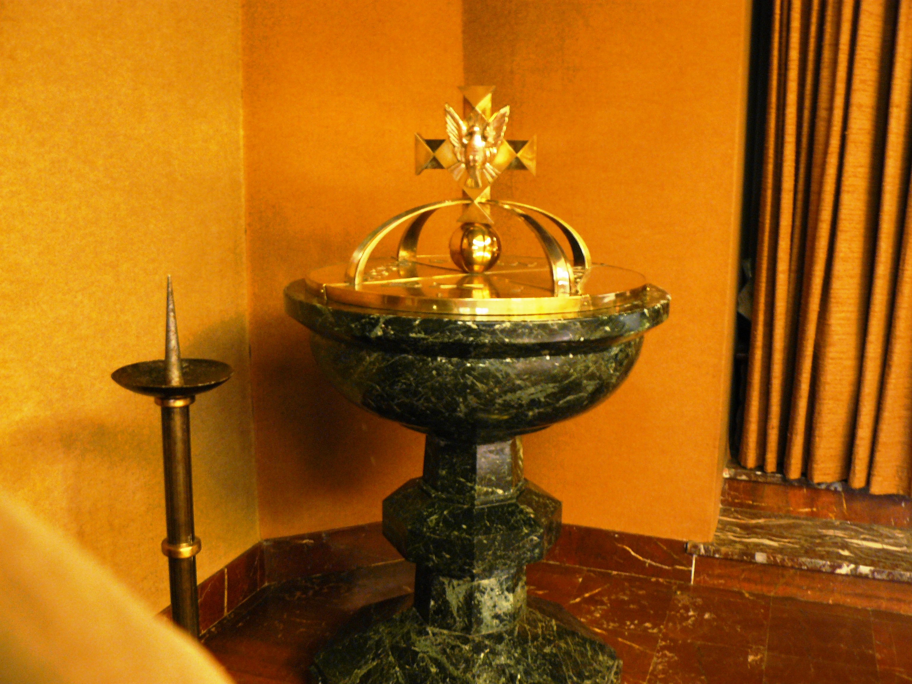 Baptistère surmonté d'une croix avec le Saint Esprit (réalisation Treser Frères de Strasbourg) au Prieuré de Thierenbach (Haut-Rhin).